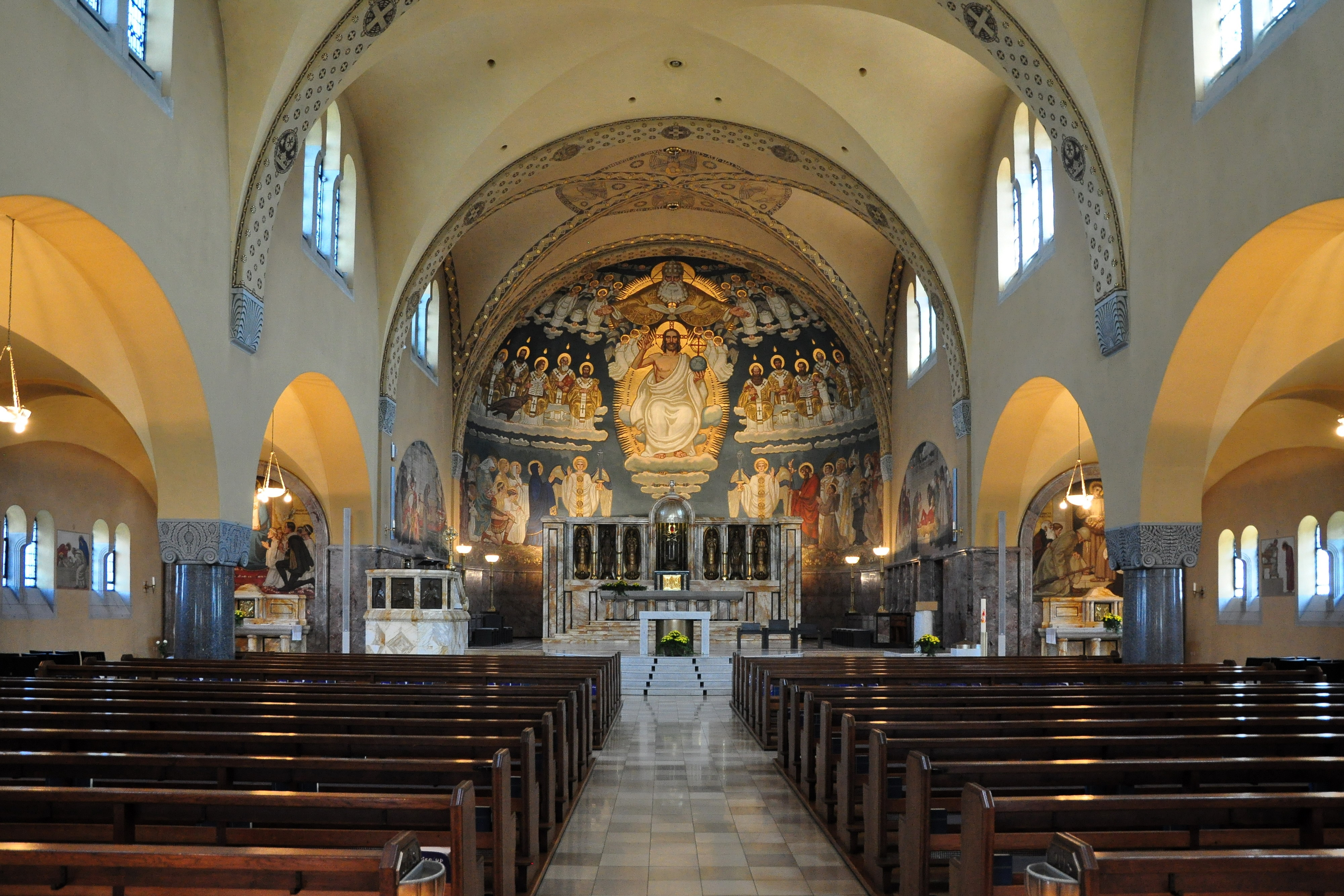 Katholische Kirche St. Antonius in Zürich-Hottingen (Switzerland)